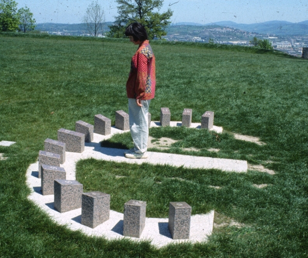 cadran solaire analemmatique à Saint-Etienne France